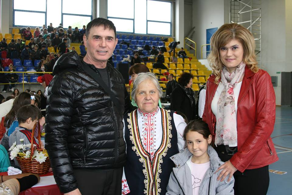 И добрината воскресе в Елин Пелин